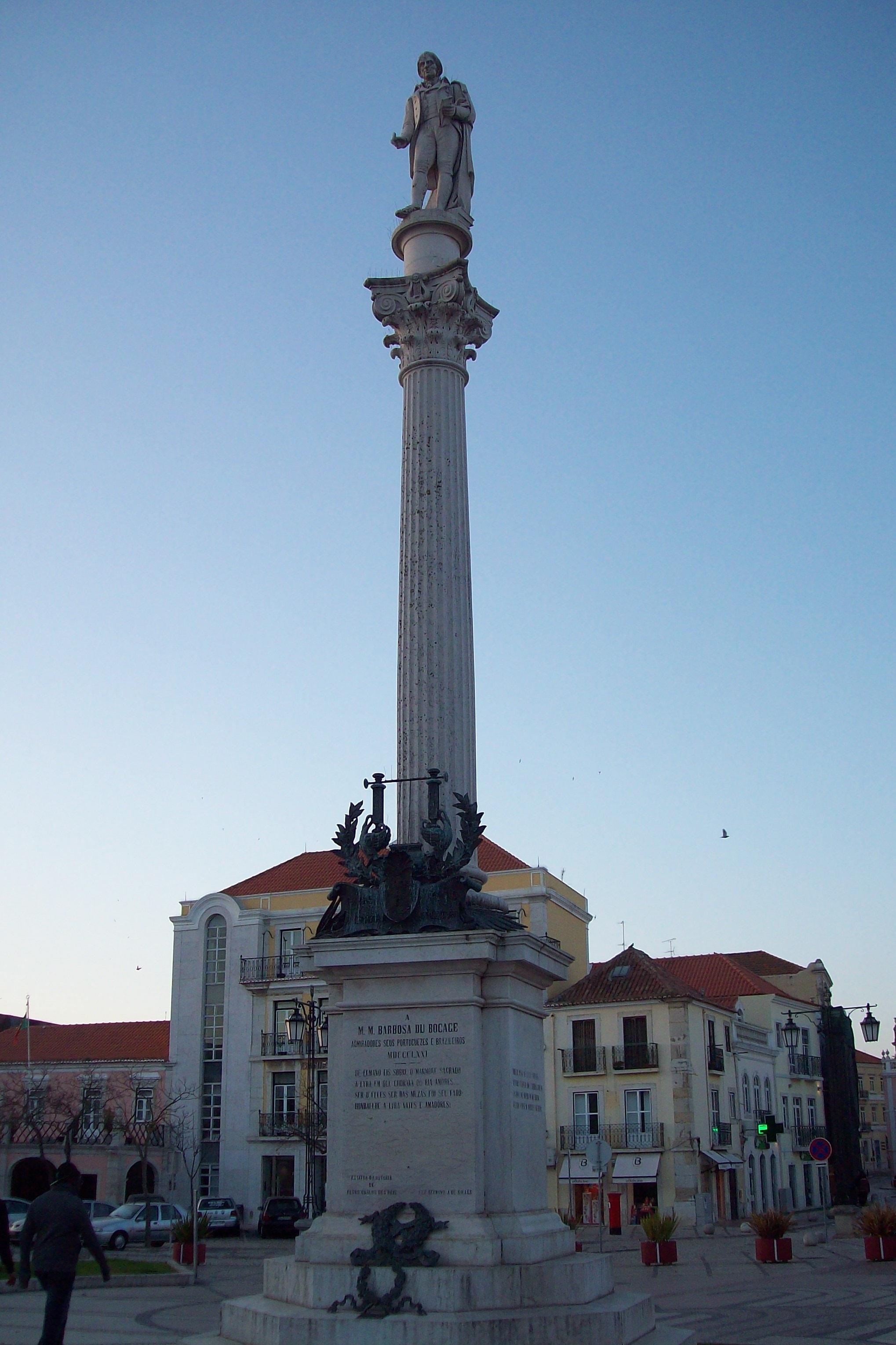 Estátua ao poeta setubalense Bocage, na praça de seu nome